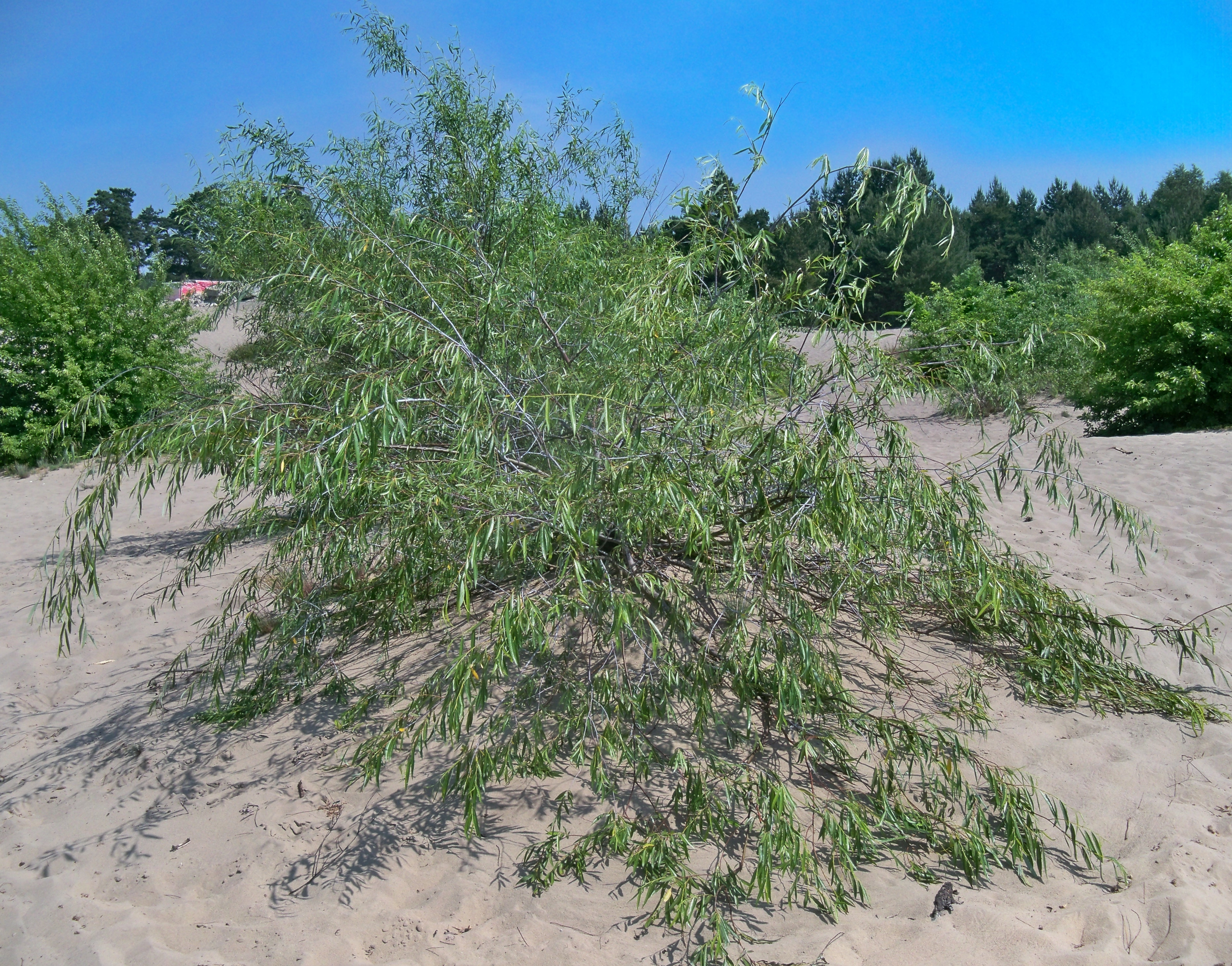 Wierzba kaspijska na skraju Pustyni Błędowskiej